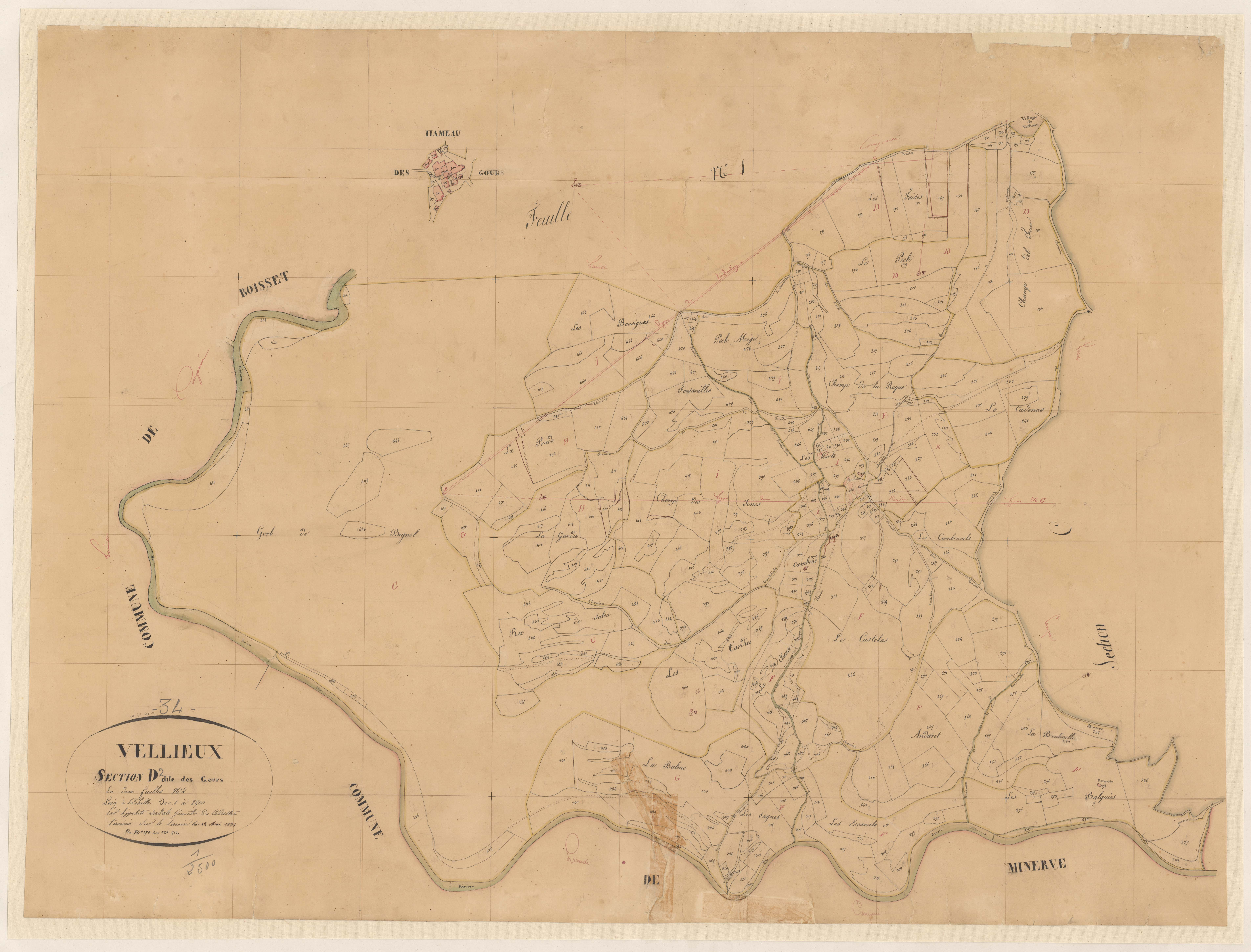 Vélieux. - Cadastre napoléonien : plan de la section D2 des Gours